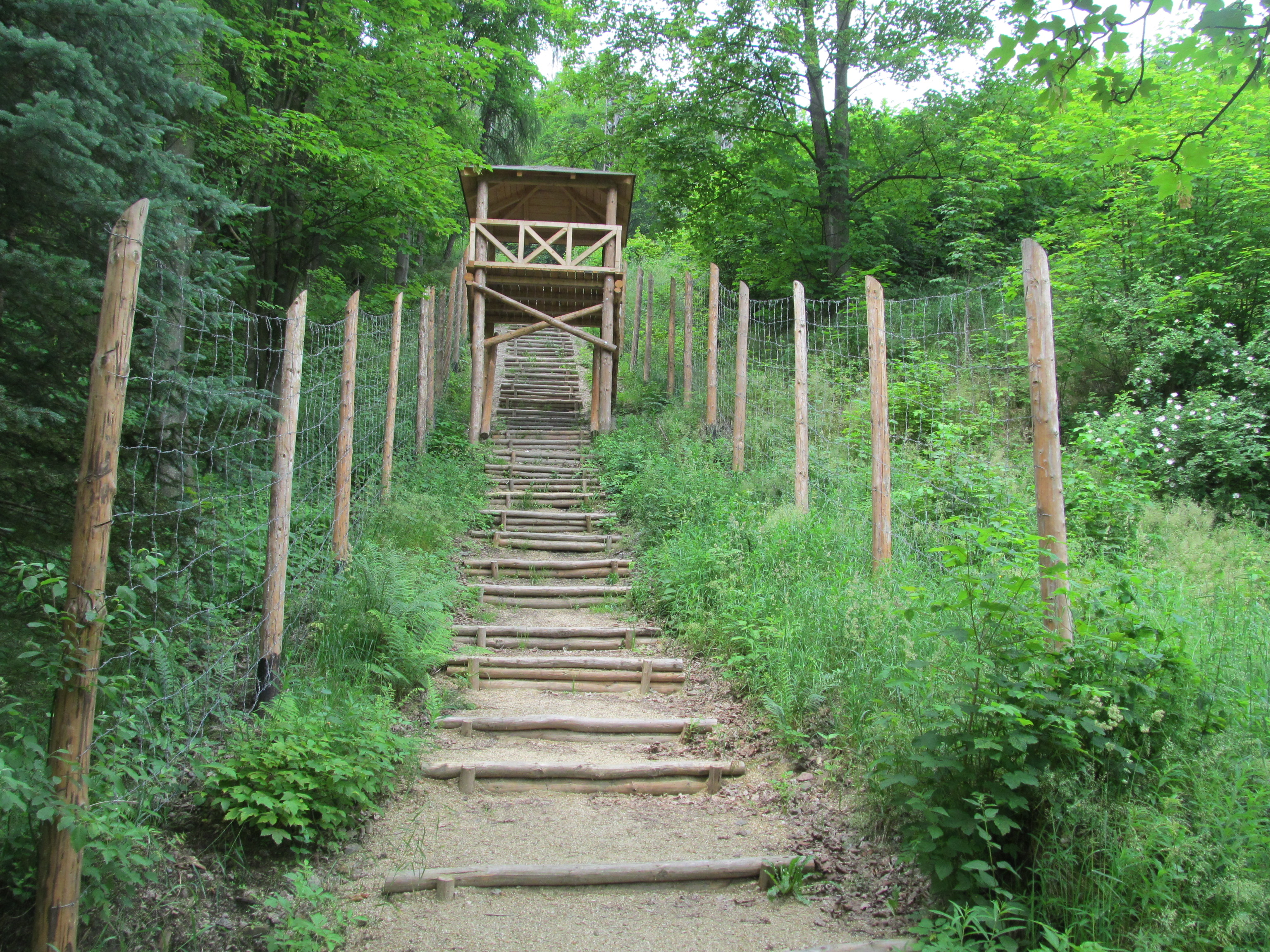 Schody hrůzy v Jáchymově u dolu Svornost